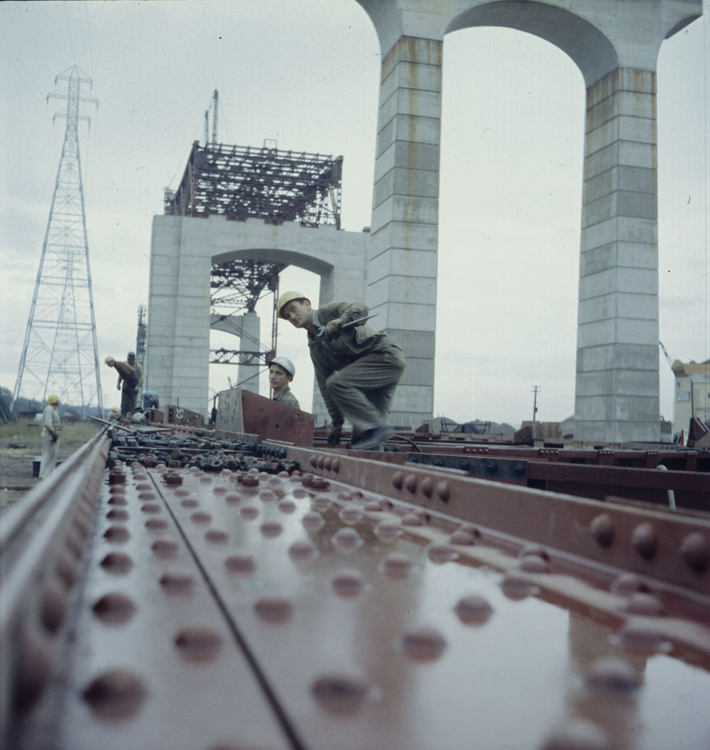 Construction workers climbing up on a section of the bridge which is still on the ground. In the background can be seen the large piers which will hold up the complete bridge. Burlington Causeway, Ontario. [Travailleurs de la construction oeuvrant sur une section du pont, près du sol. À l'arrière, on voit les piliers qui soutiendront l'ensemble du pont. Burlington Causeway, Ontario.]